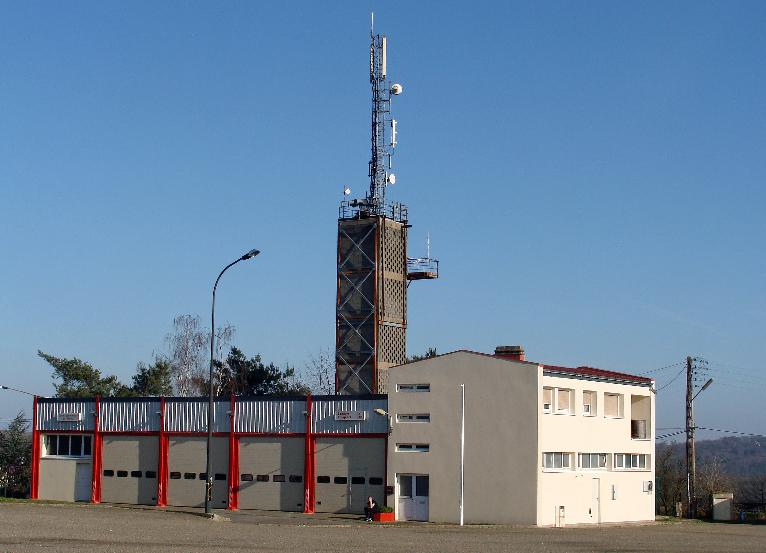 Caserne des pompiers de L'Hôpital (Moselle), place du Marché. Photo prise le 9 mars 2014.